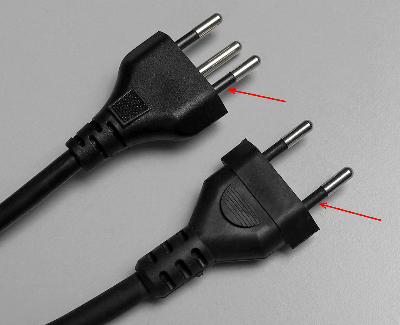 fiches suisses du site